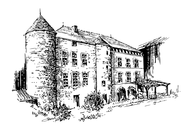 Graphique du château